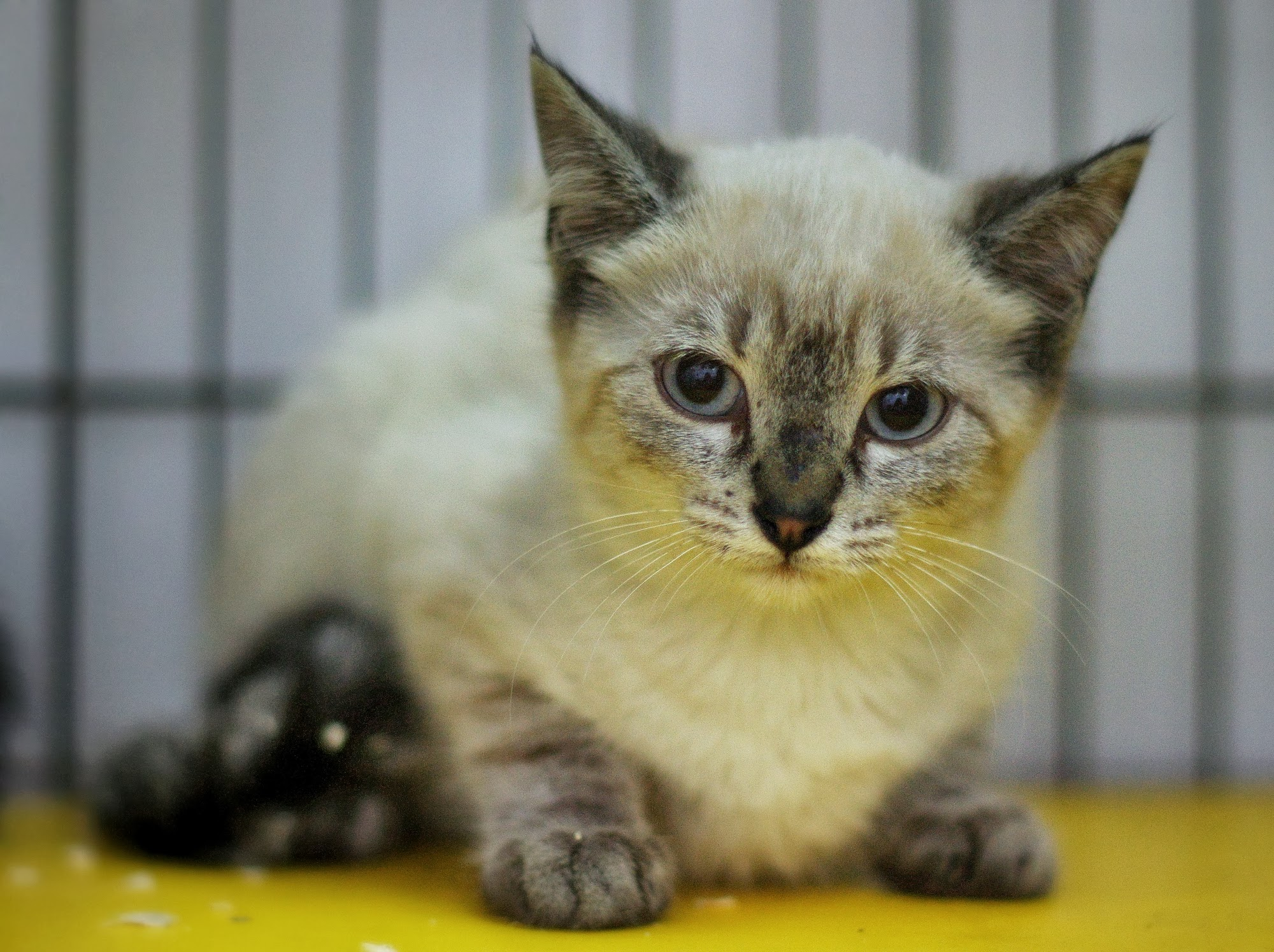 Kilkutygodniowy kociak o ubarwieniu kolorpoint, zdjęcie zrobione w katowickim schronisku dla bezdomnych zwierząt.